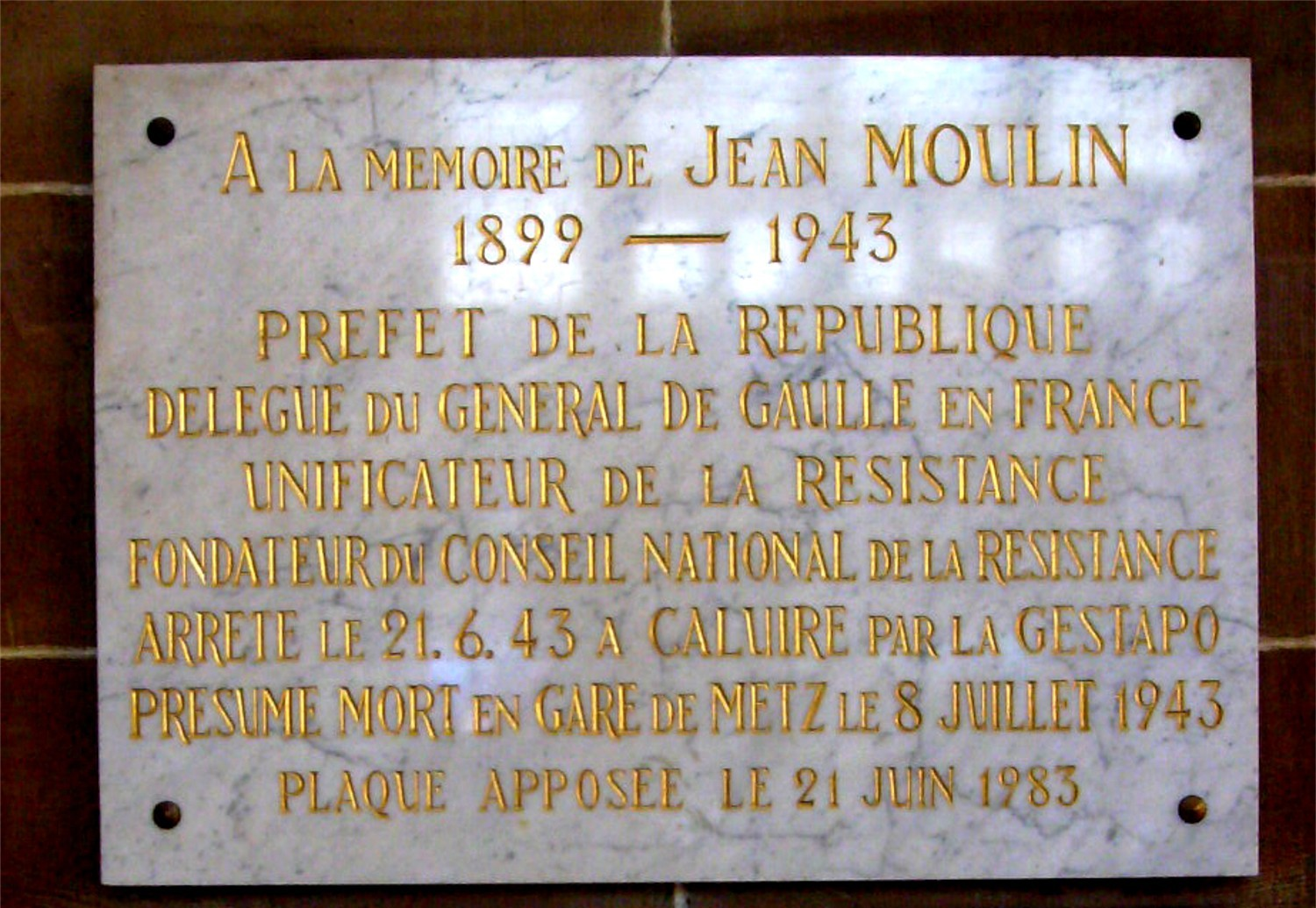 Plaque commémorative Jean Moulin 8 juillet 1943